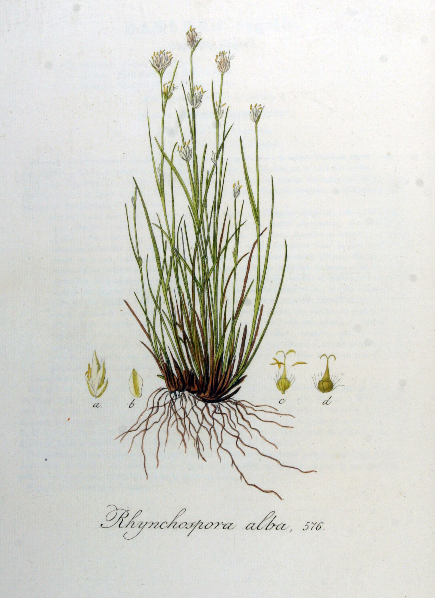 Rhynchospora alba (L.) Vahl